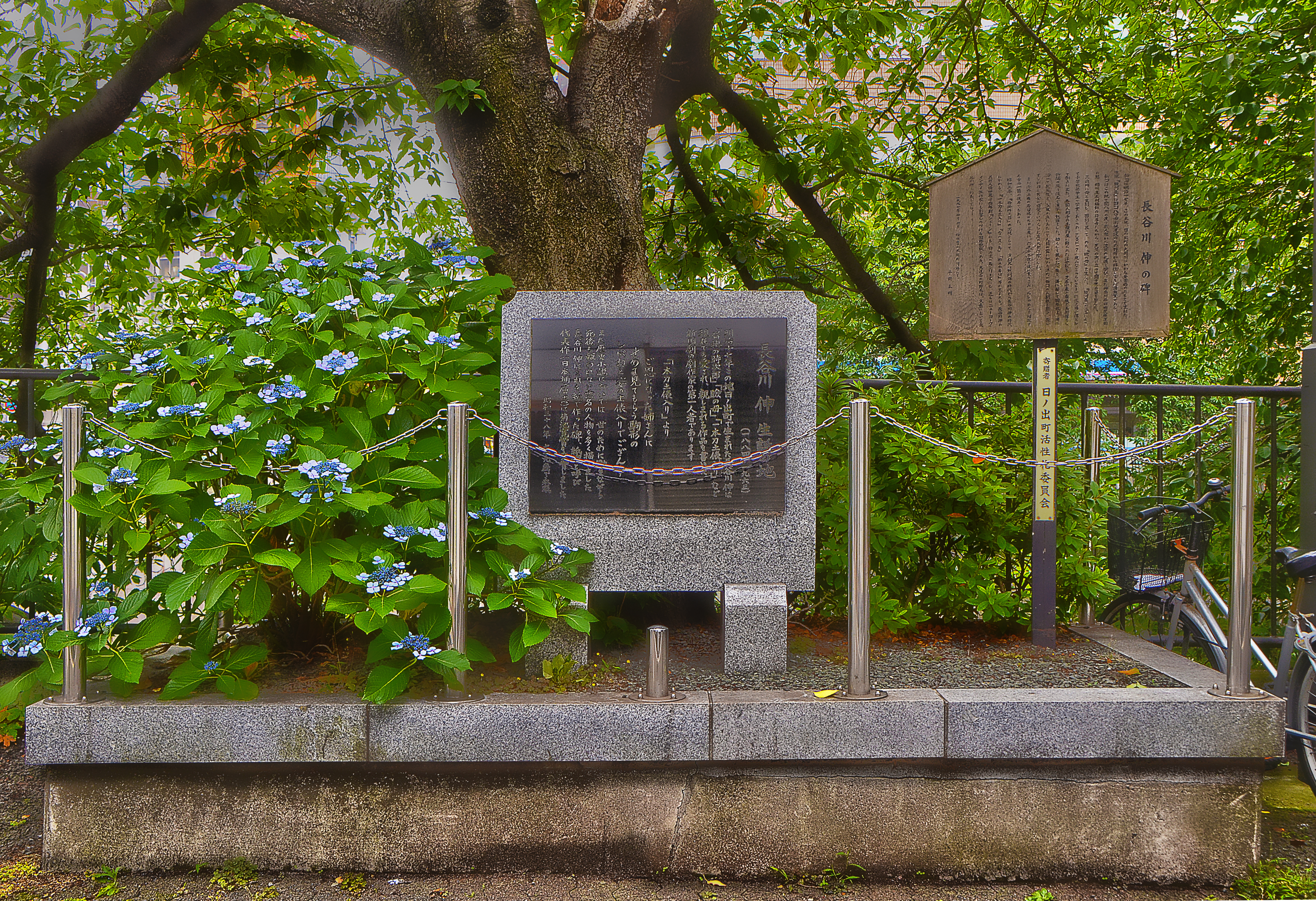 日ノ出町にある長谷川 伸の碑